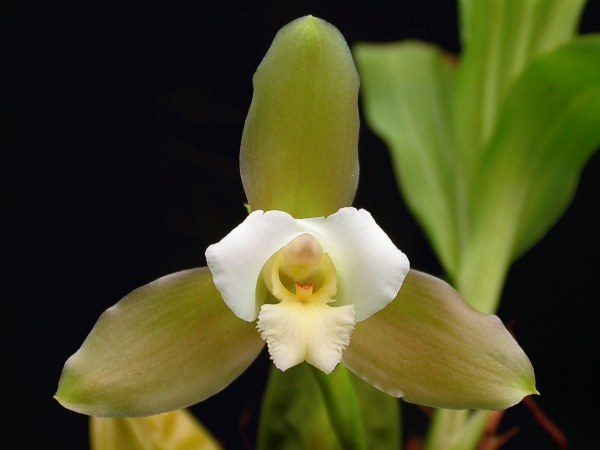 Lycaste macrophylla